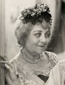 Hattie Delaro